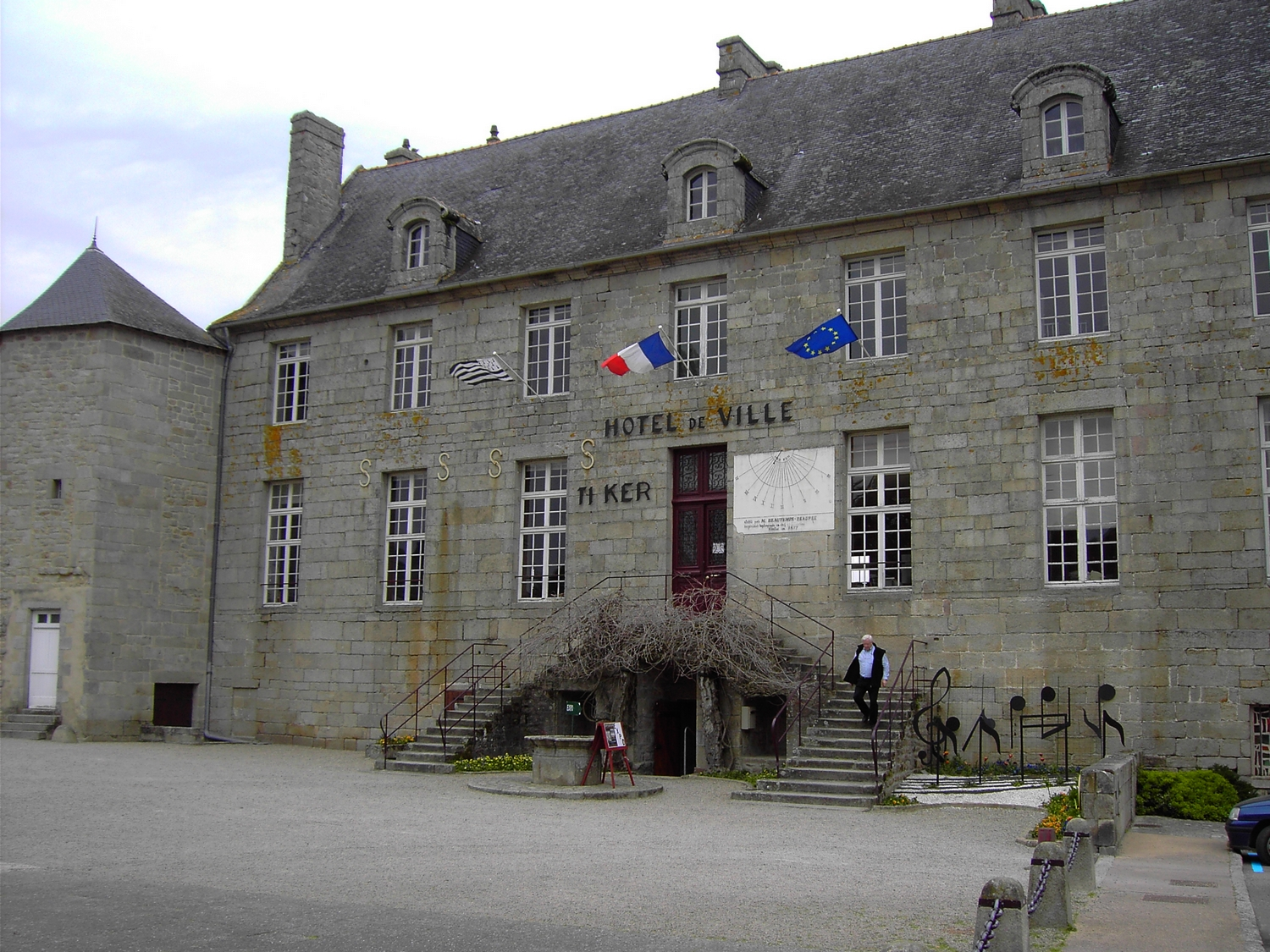 Château des Barons du Pont, actuel Hôtel de Ville, Pont-l'Abbé, Finistère